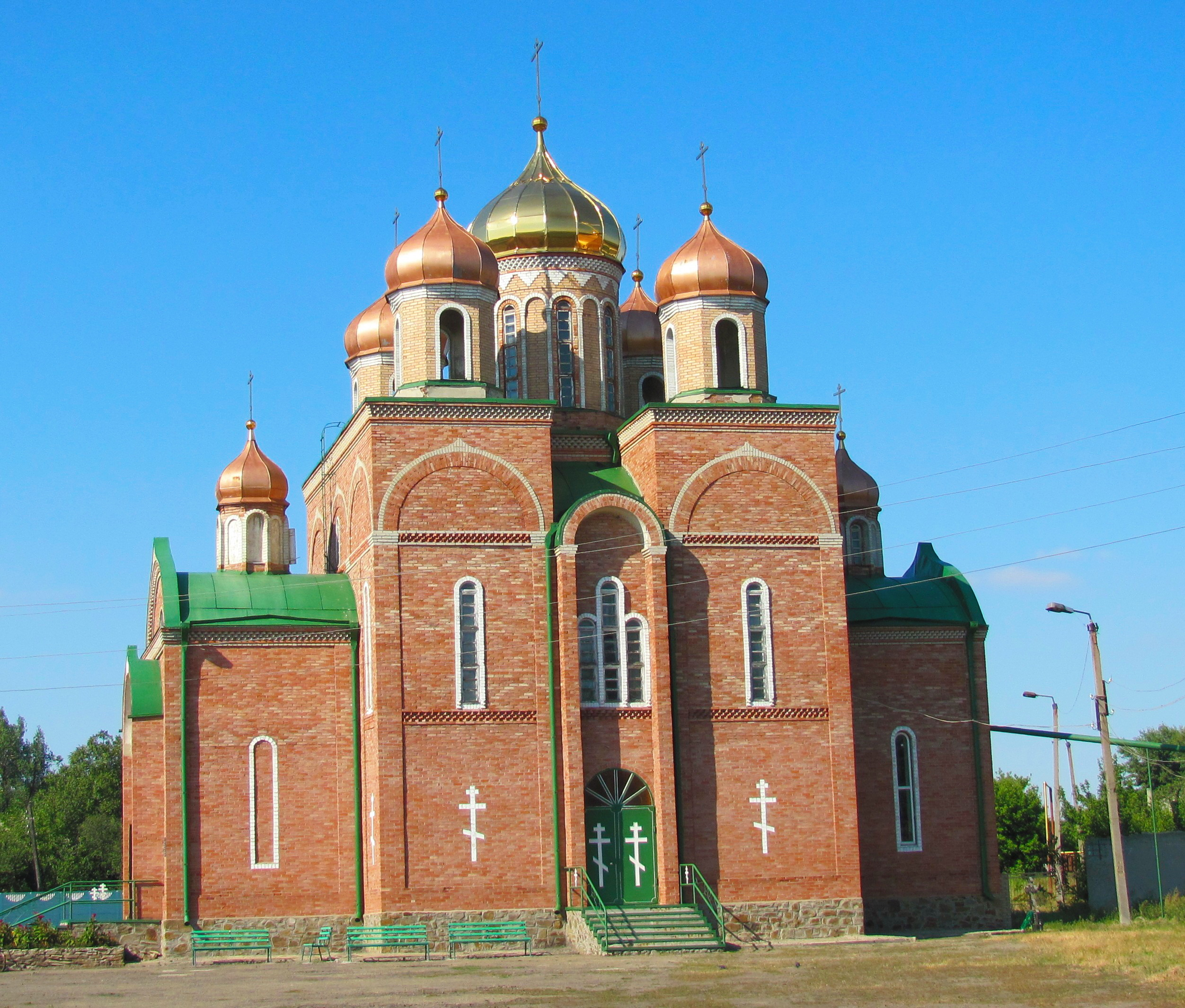 Червонопартизанск